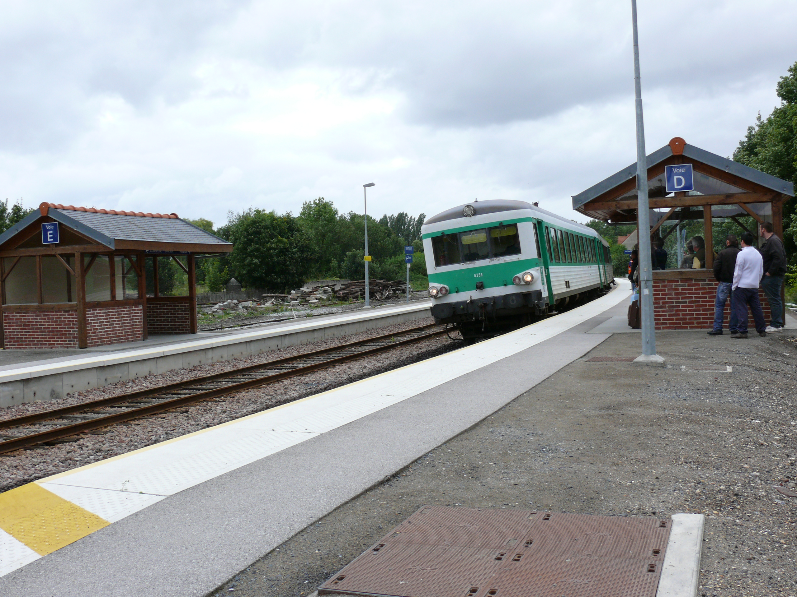 Gare de Montdidier : Arrivée d'un train en provenance de Moreuil.